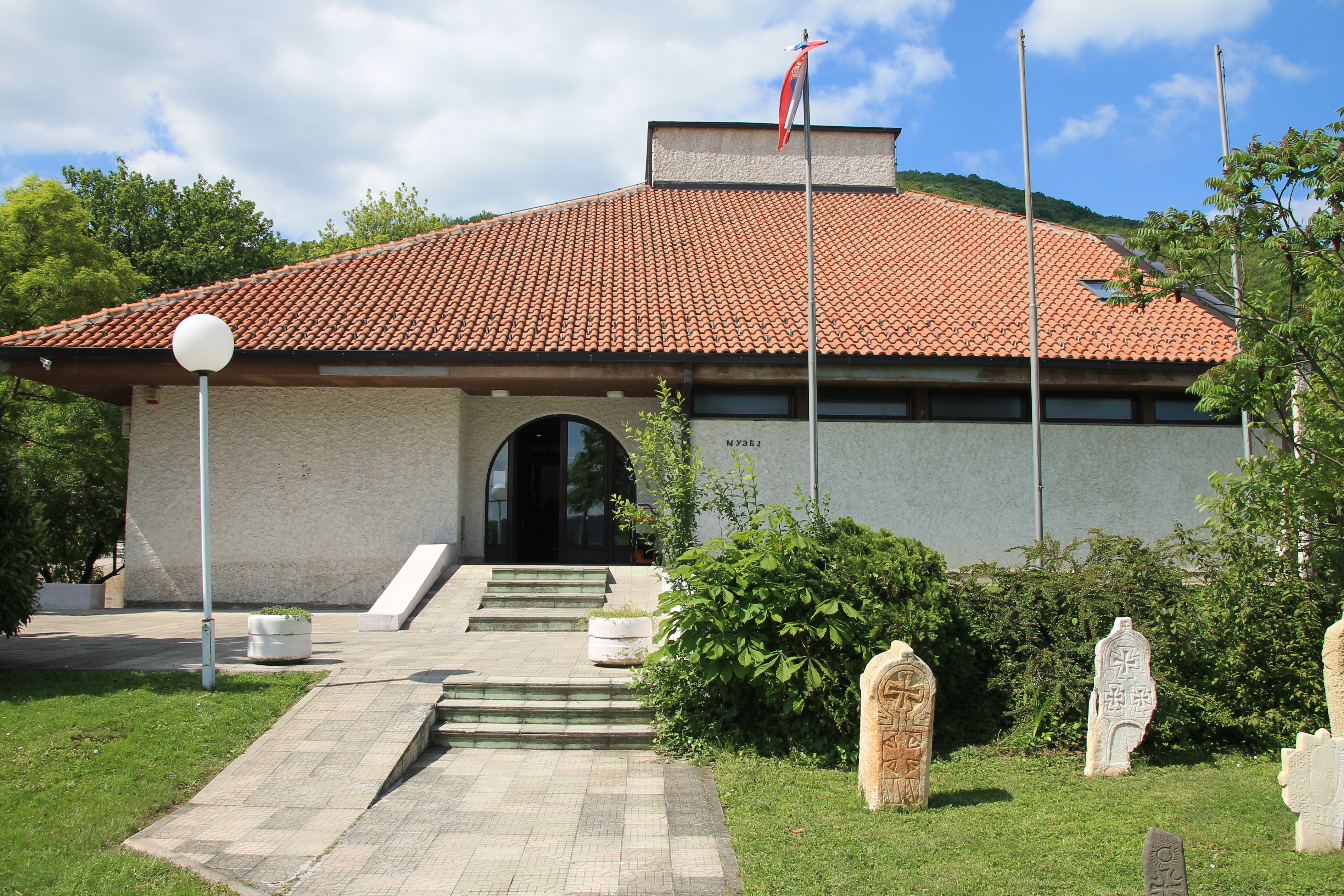 Narodni muzej Aranđelovac